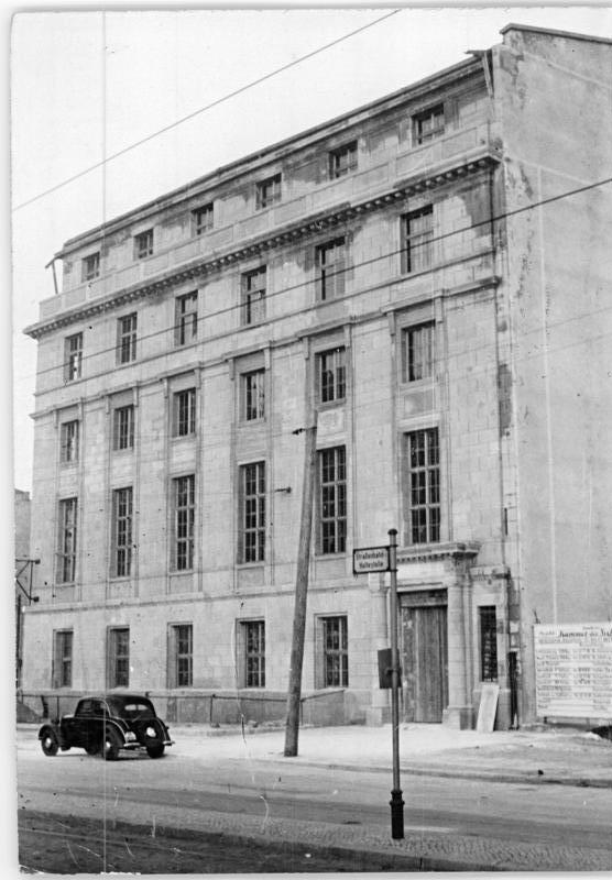 Illus Funck 31.1.1951 Neues Gebäude der Kammer der Technik. Das schwerbeschädigte Haus Dorotheenstrasse 43 in Berlin, dessen Inneneinrichtung völlig zerstört war, ist jetzt wiederhergestellt und wird nach Vollendung des inneren Ausbaus in Kürze von der Kammer der Technik bezogen werden.